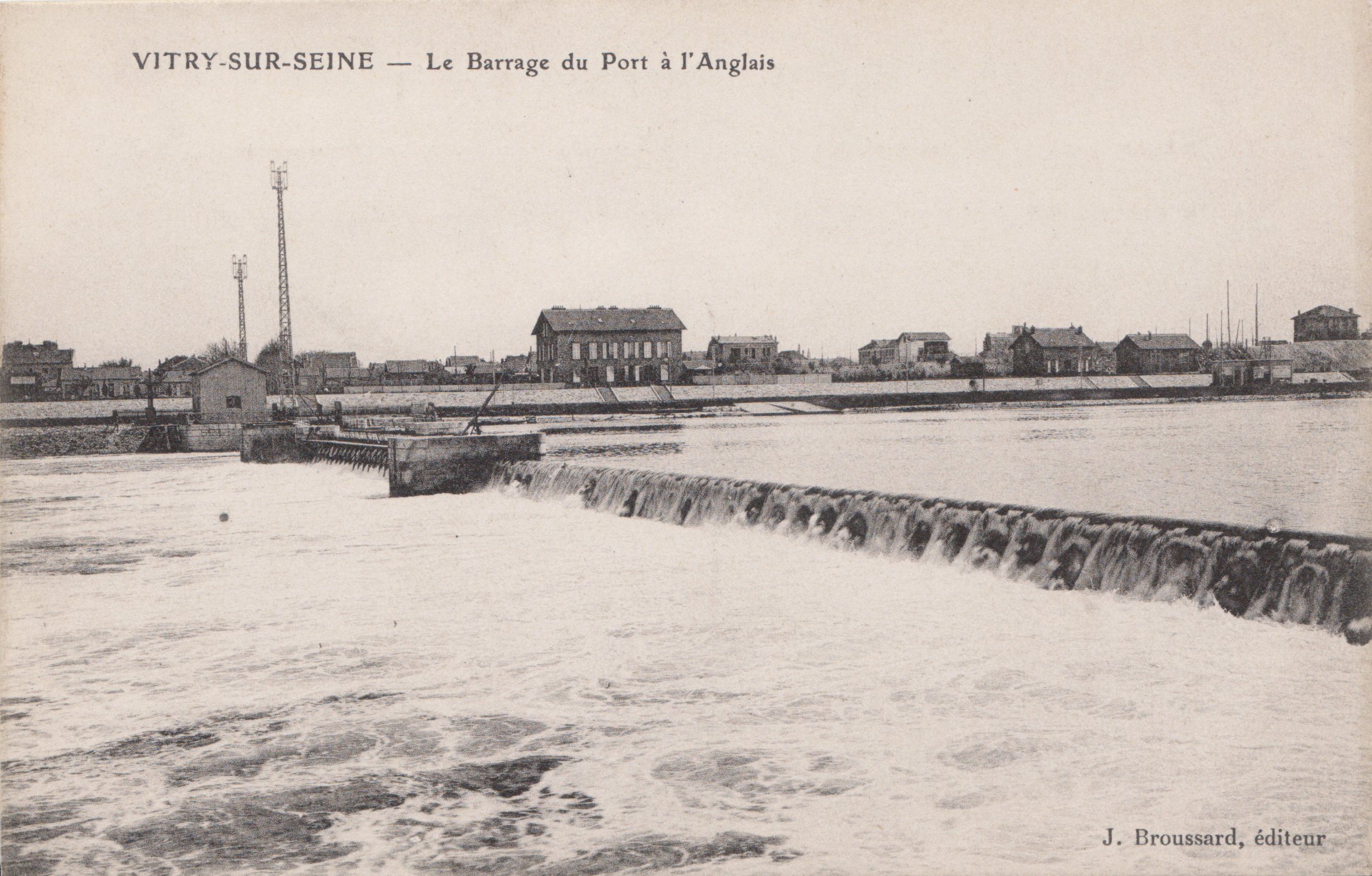 Barrage du port à l'anglais, Vitry-sur-Seine, carte postale du début du XXe.